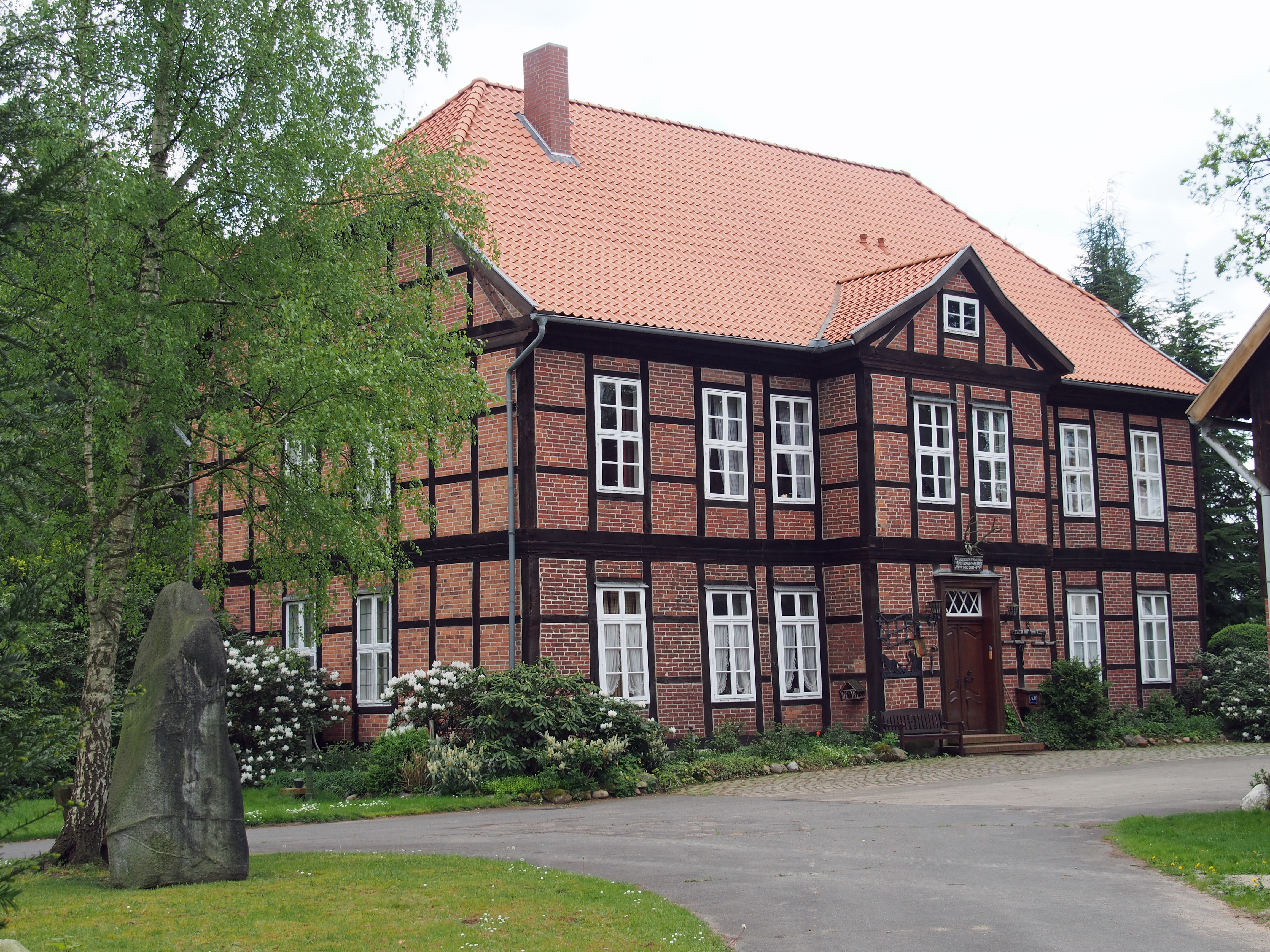 Denkmalgeschützter Gutshof "Rittergut III" in Eversen, Stadt Bergen (Niedersachsen)